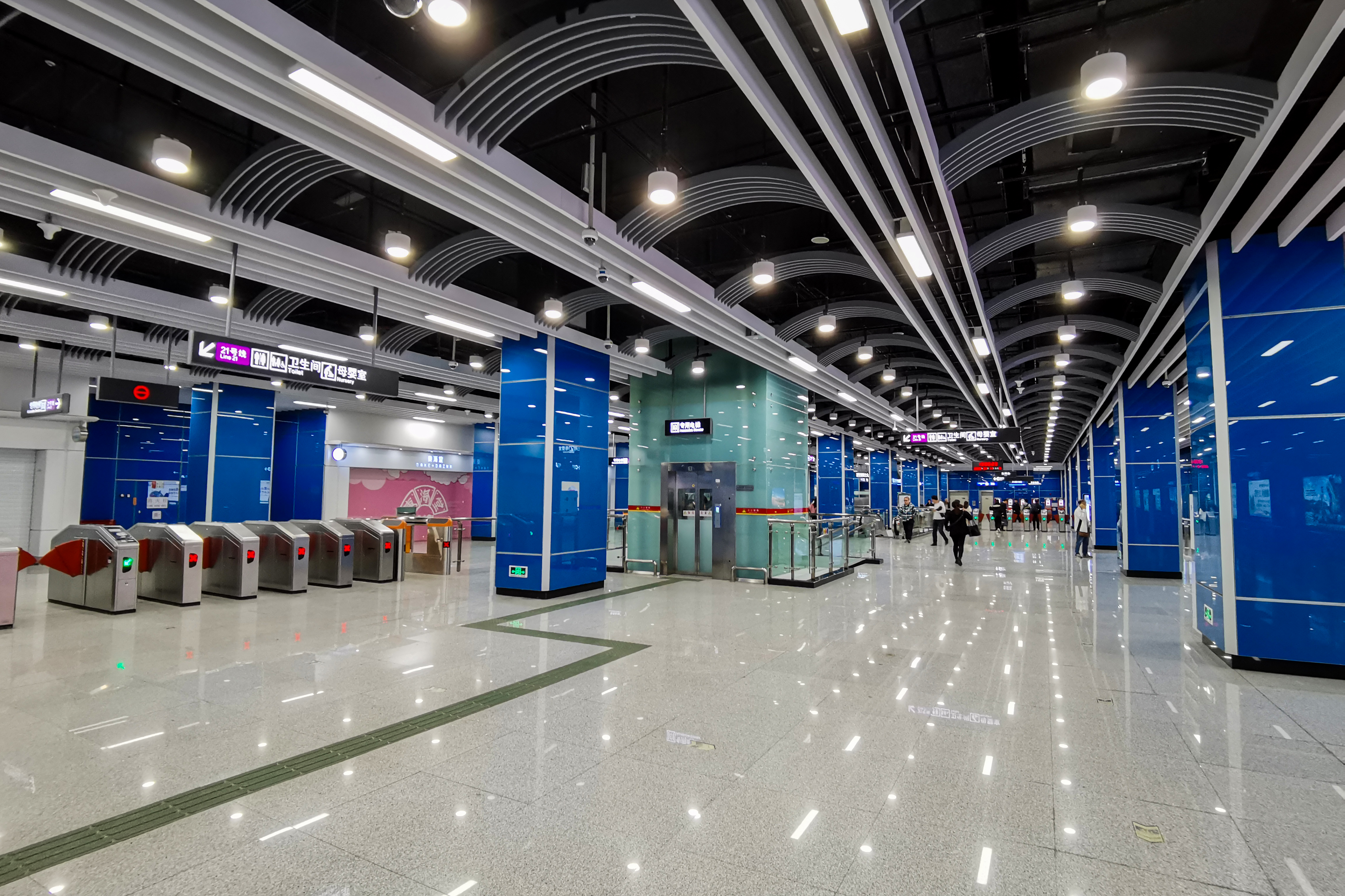 广州地铁中新站